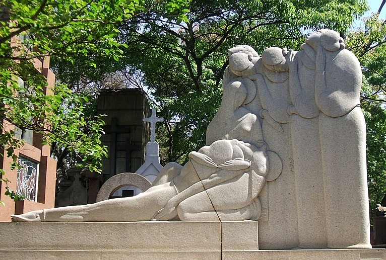 Victor Brecheret (1894-1955) - Túmulo de Olívia Guedes Penteado, Cemitério da Consolação, São Paulo, Brasil